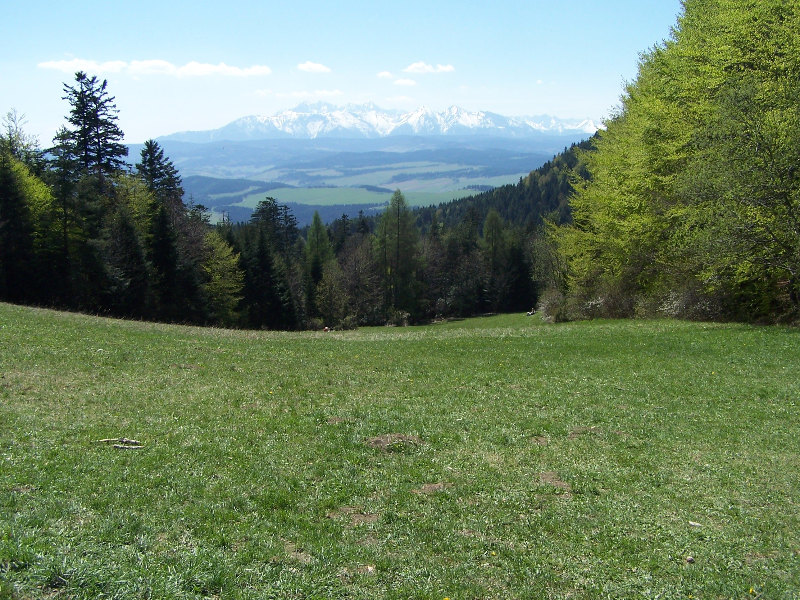 Polana Szopka